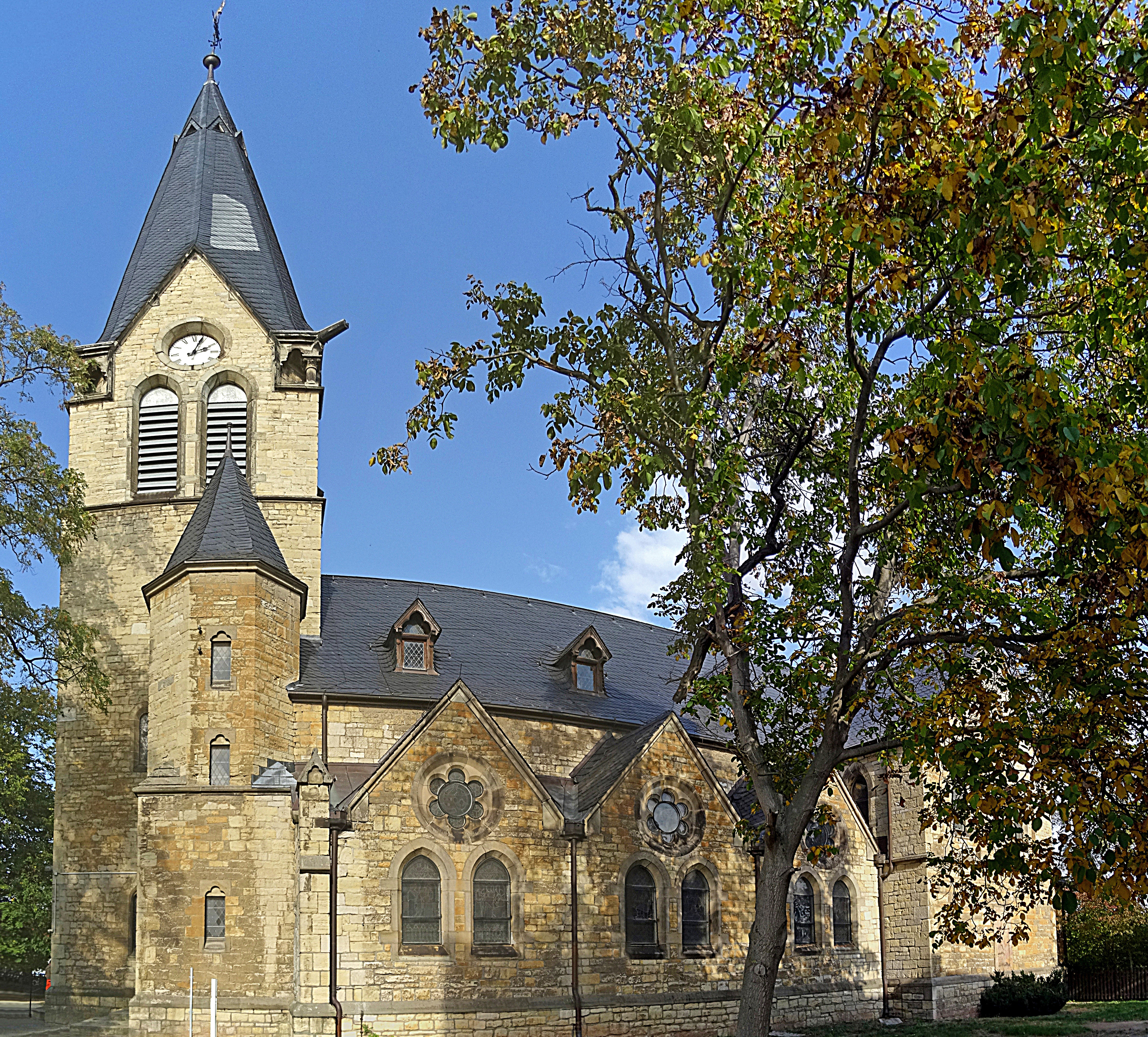 Kirche St. Gertrud Neugattersleben von Süden